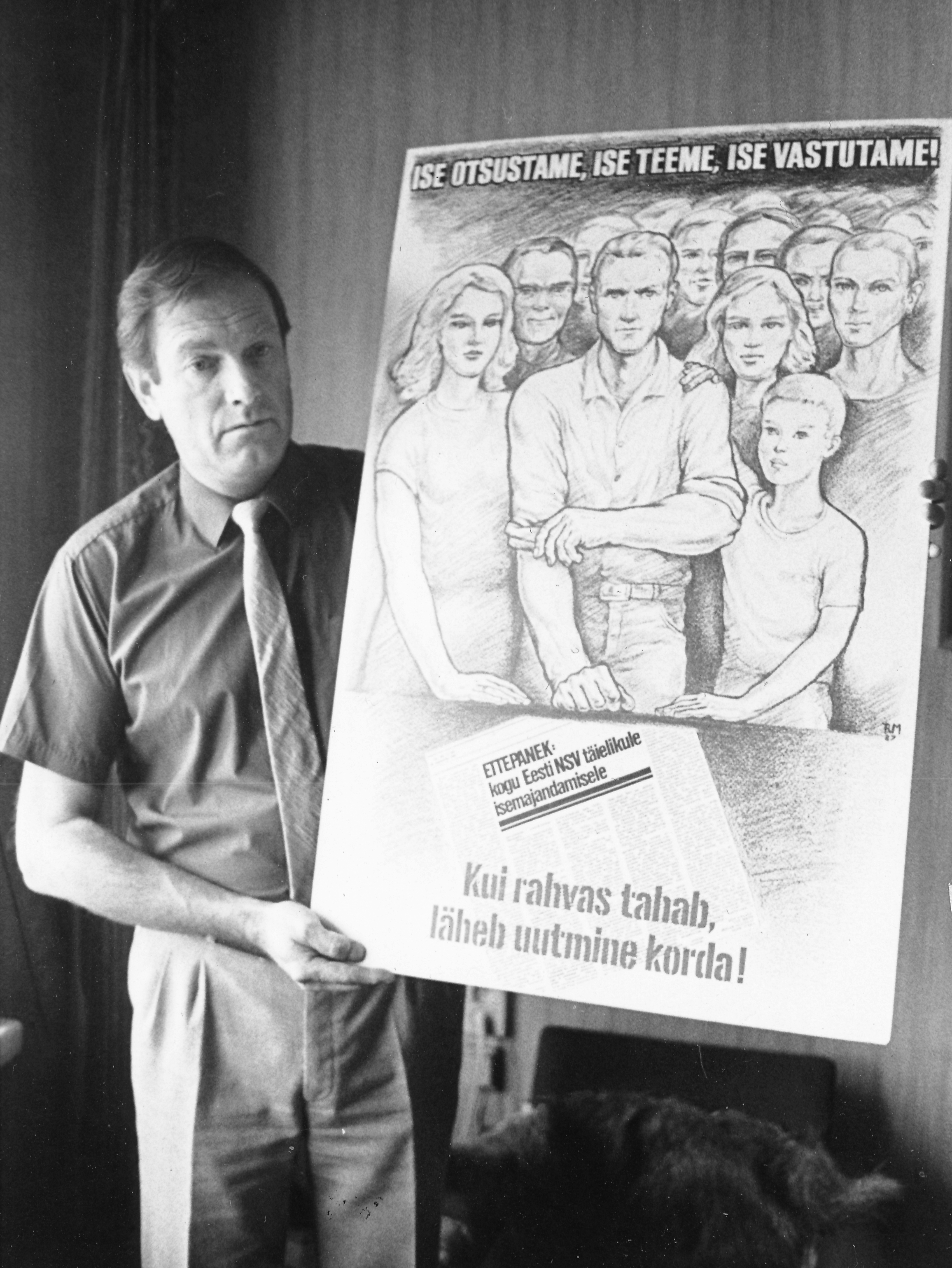 Tiit Made Rein Mägari loodud nelja mehe ettepaneku plakatiga. Pildistatud Tiit Made kodus 1987. aastal.